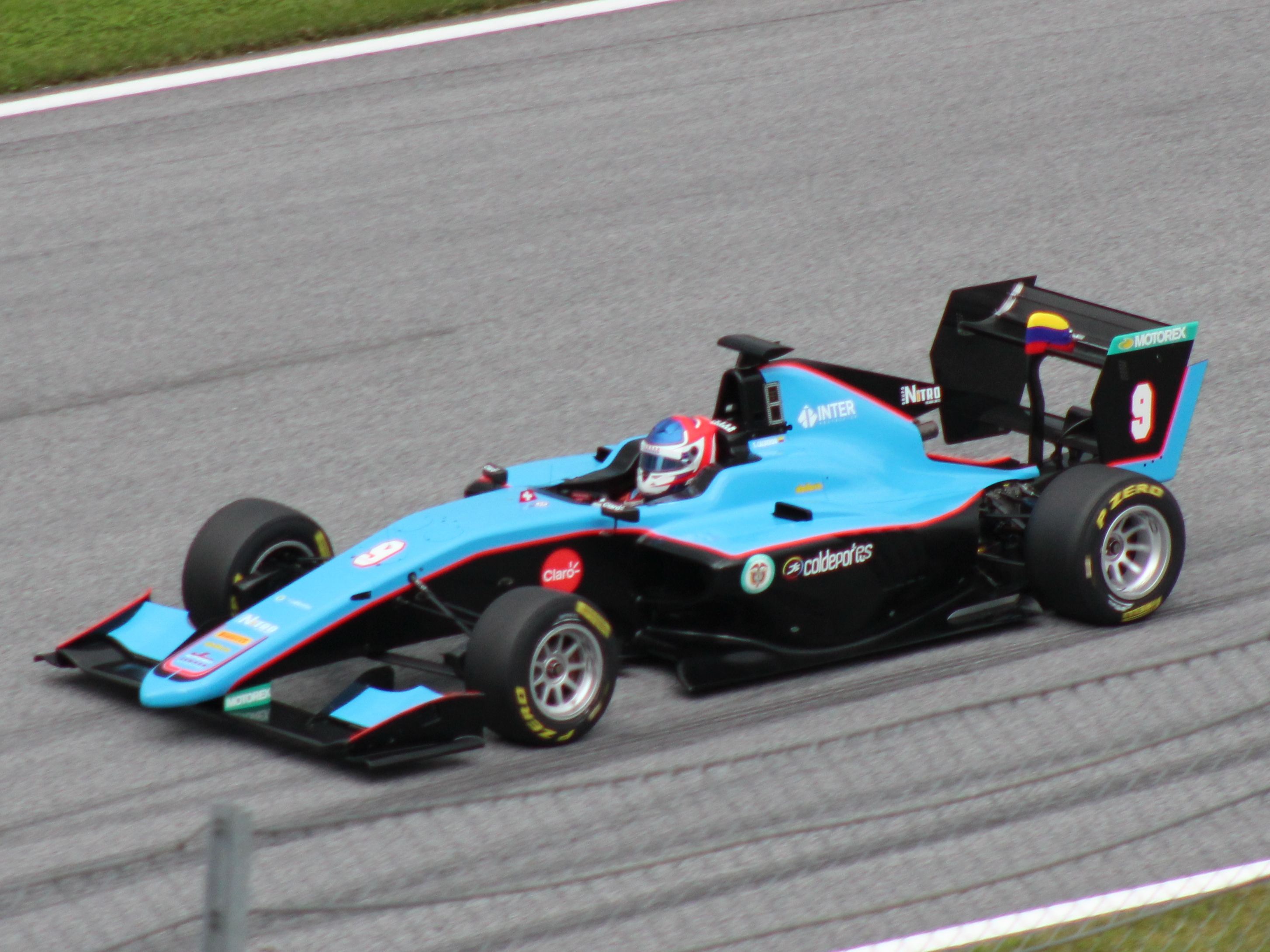 09 Tatiana Calderón beim Rennwochenende in Österreich 2018